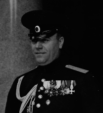 Фотография на ген. Антон Ганев, военно аташе на Царство България в Полша.